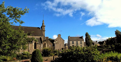 rue des écoliers